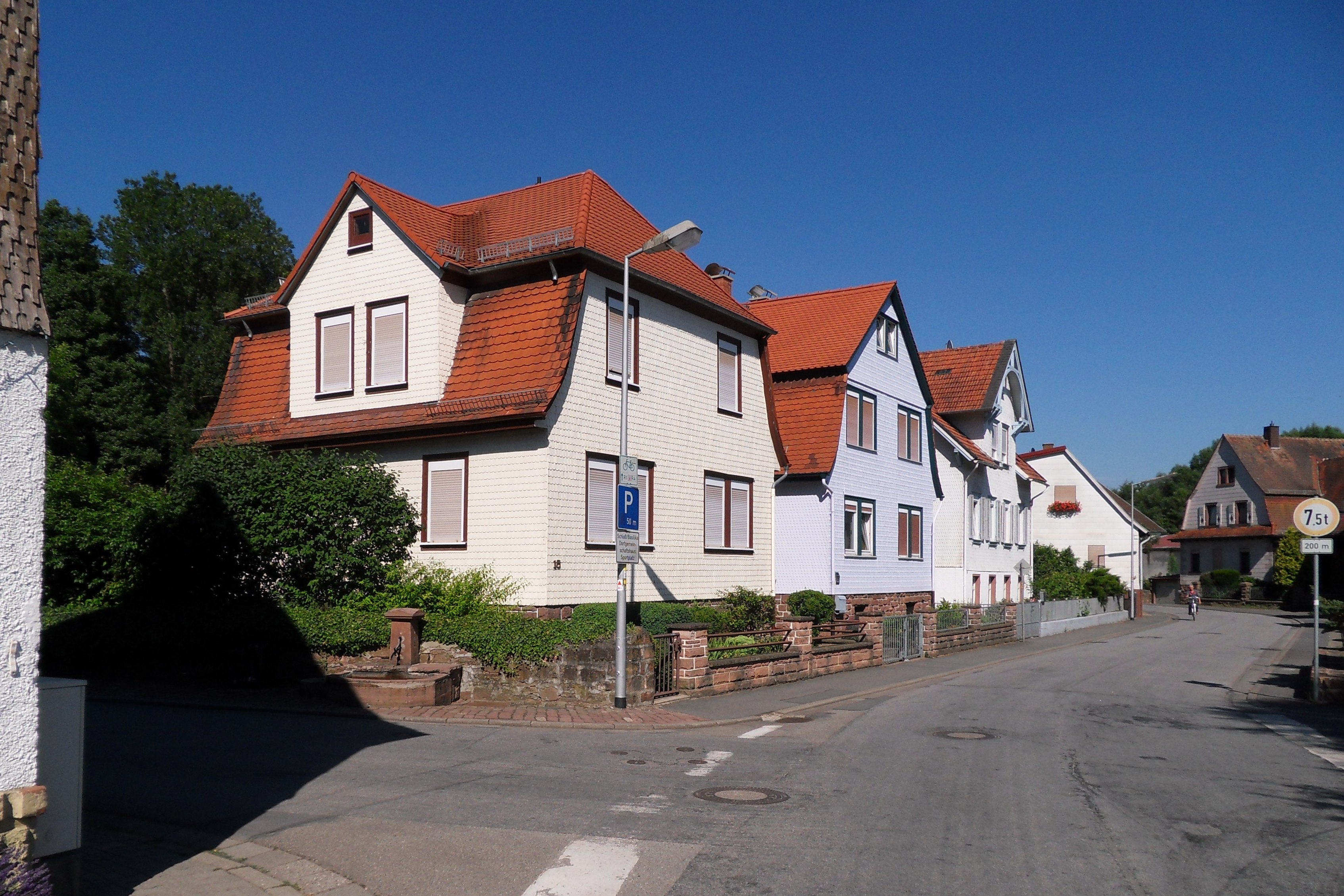 Schloßstraße in Steinbach bei Michelstadt mit denkmalgeschütztem Laufbrunnen von 1840 an einem ebenfalls denkmalgeschützten Relikt der 1869 erbauten und Schlossgartenmauer